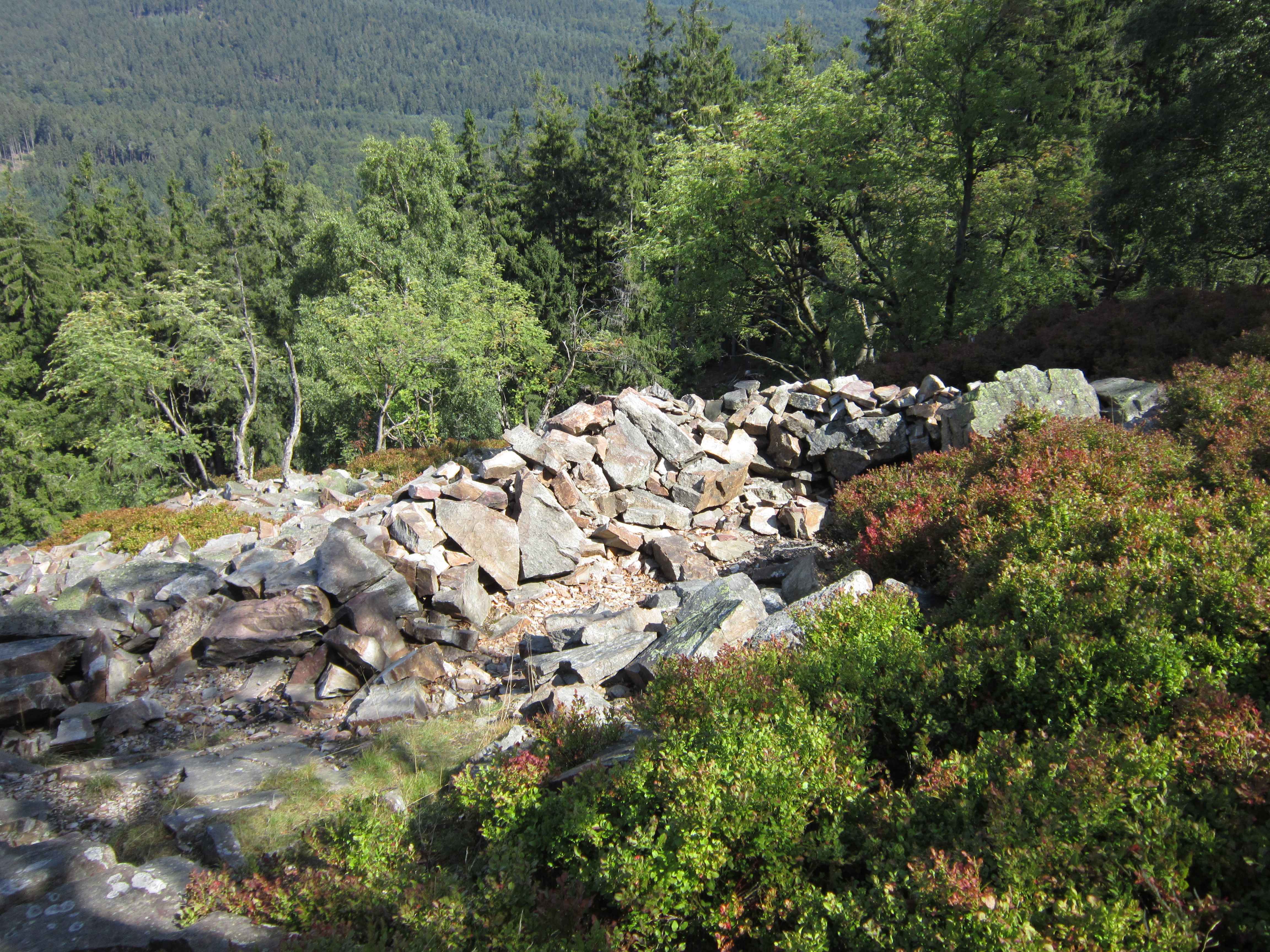 Weiße Mauer nahe Altkönig TS